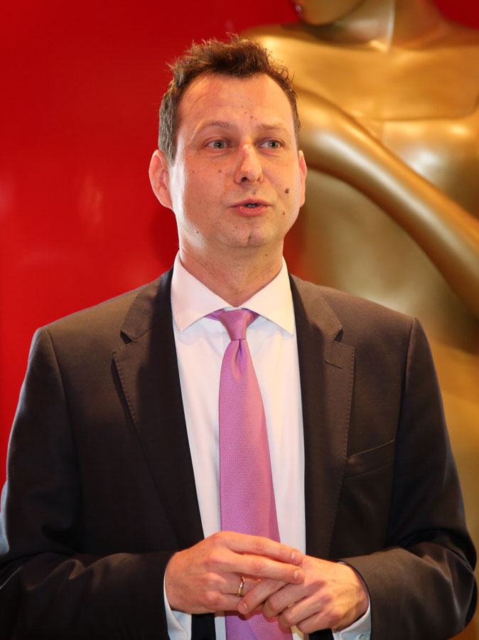 Alexander Hofer (ORF)-6189